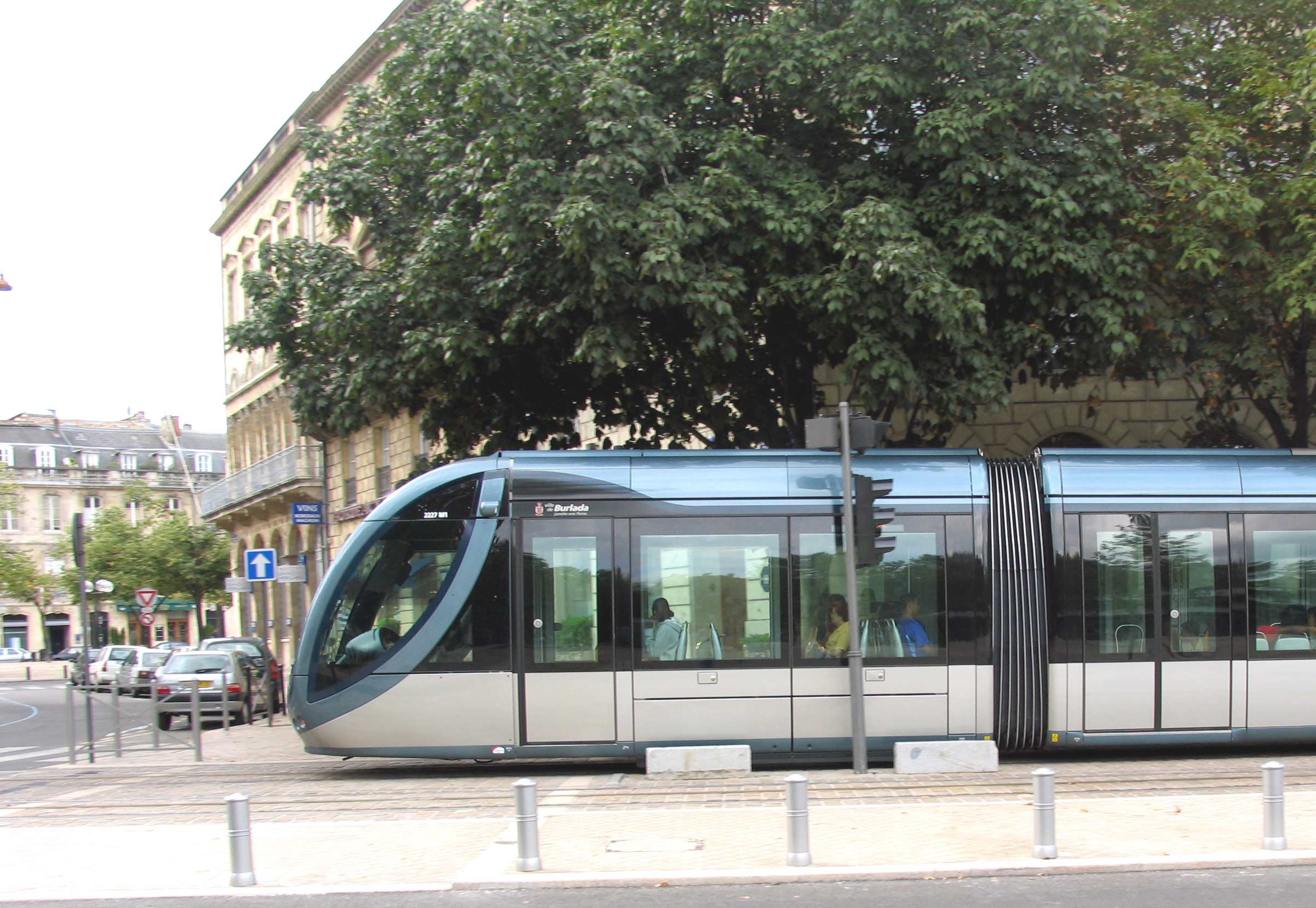 Description : Tramway Bordeaux. On peut remarquer l'absence de caténaire sur cette partie de la ligne Place : Bordeaux, France Date : septembre 2004 Auteur : Pline photo personnelle